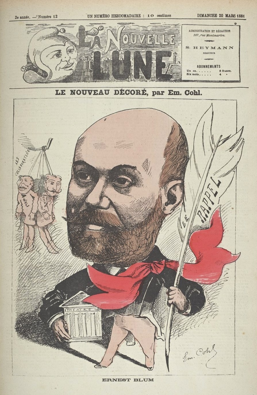 "Le nouveau décoré : Ernest Blum".